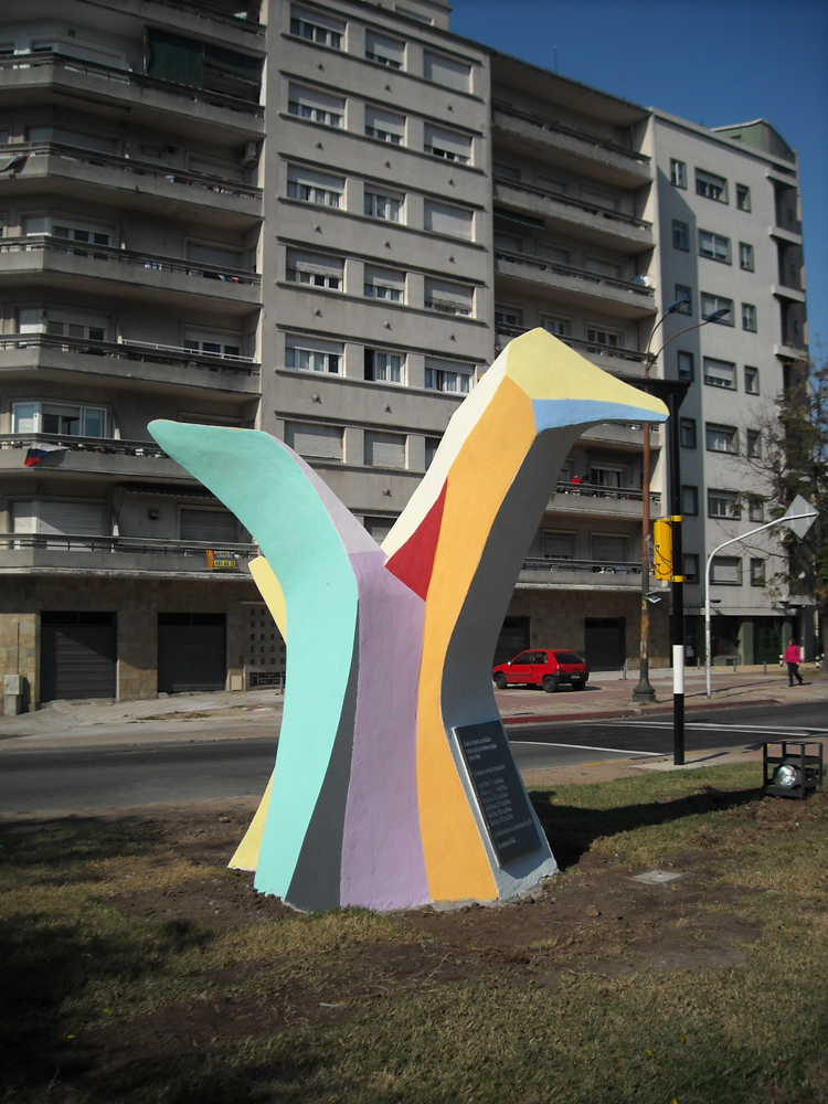 Monumento a seis estudiantes del Instituto Dámaso Antonio Larrañaga desaparecidos